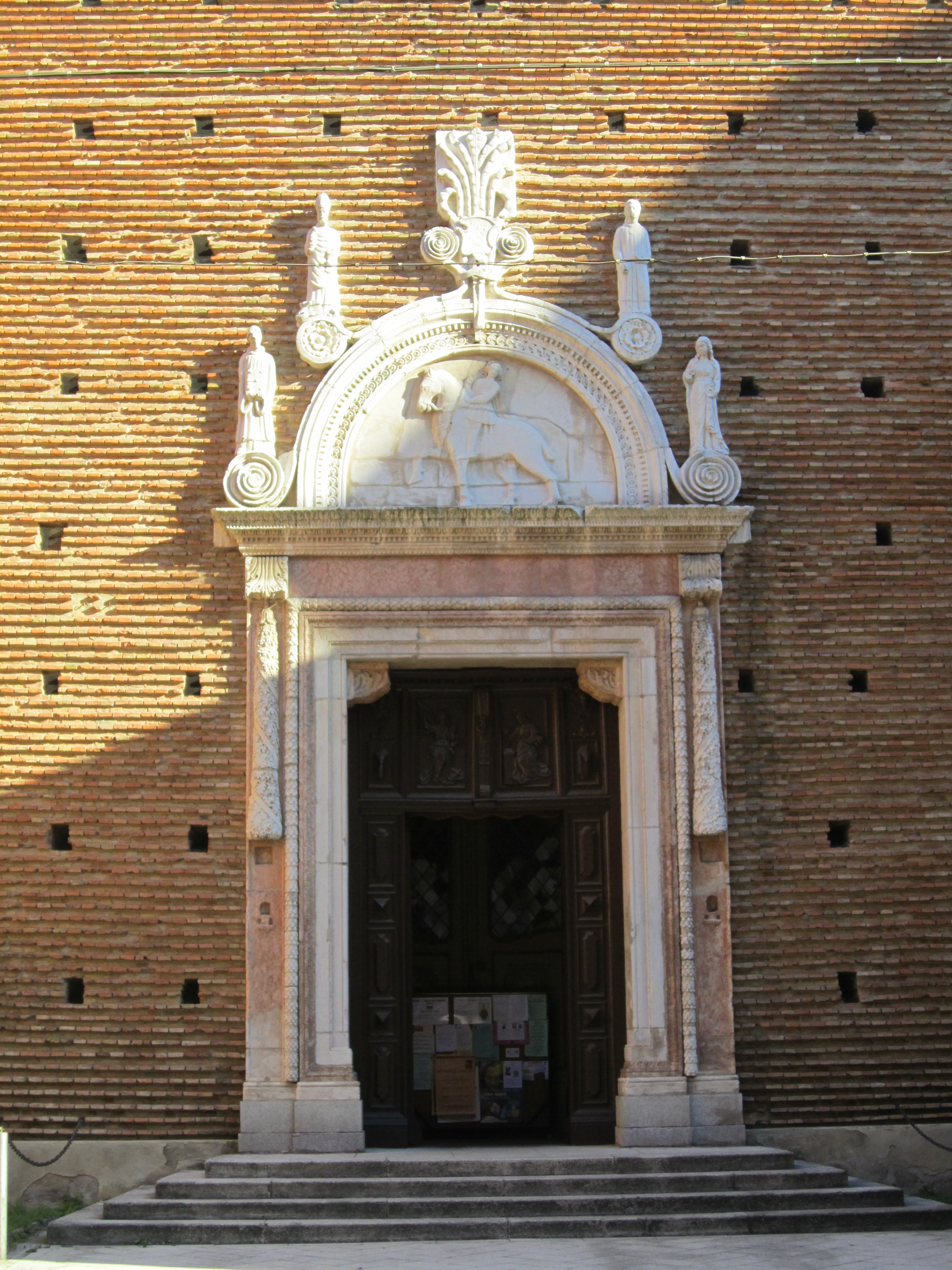 Portale, foto propria